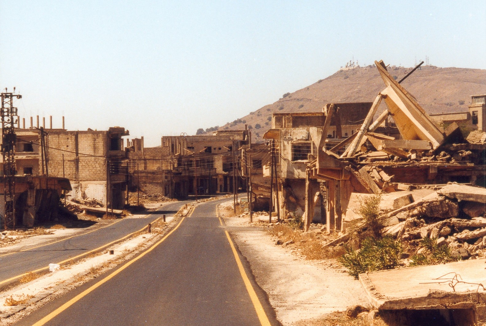 Qunaitra in the Golan Heights, Syria.